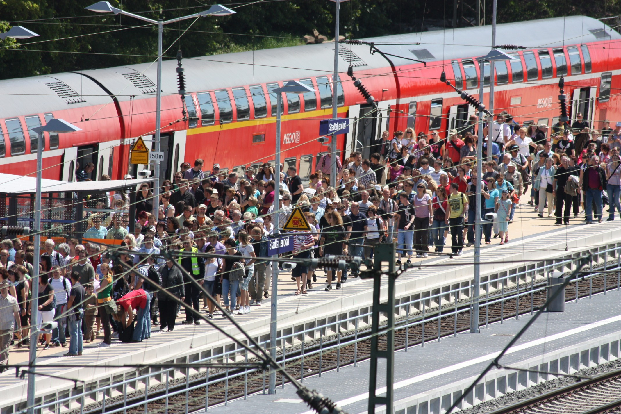 Blick auf den Stadtallendorfer Bahnhof: Wegen der nicht sehr leistungsfähigen Straßenanbindung der Stadt besuchten viele Hessentagsbesucher Stadtallendorf per Bahn. Der Rhein-Main-Verkehrsverbund schätzte die Zahl der Bus- und Bahnnutzer auf etwa 300 000.